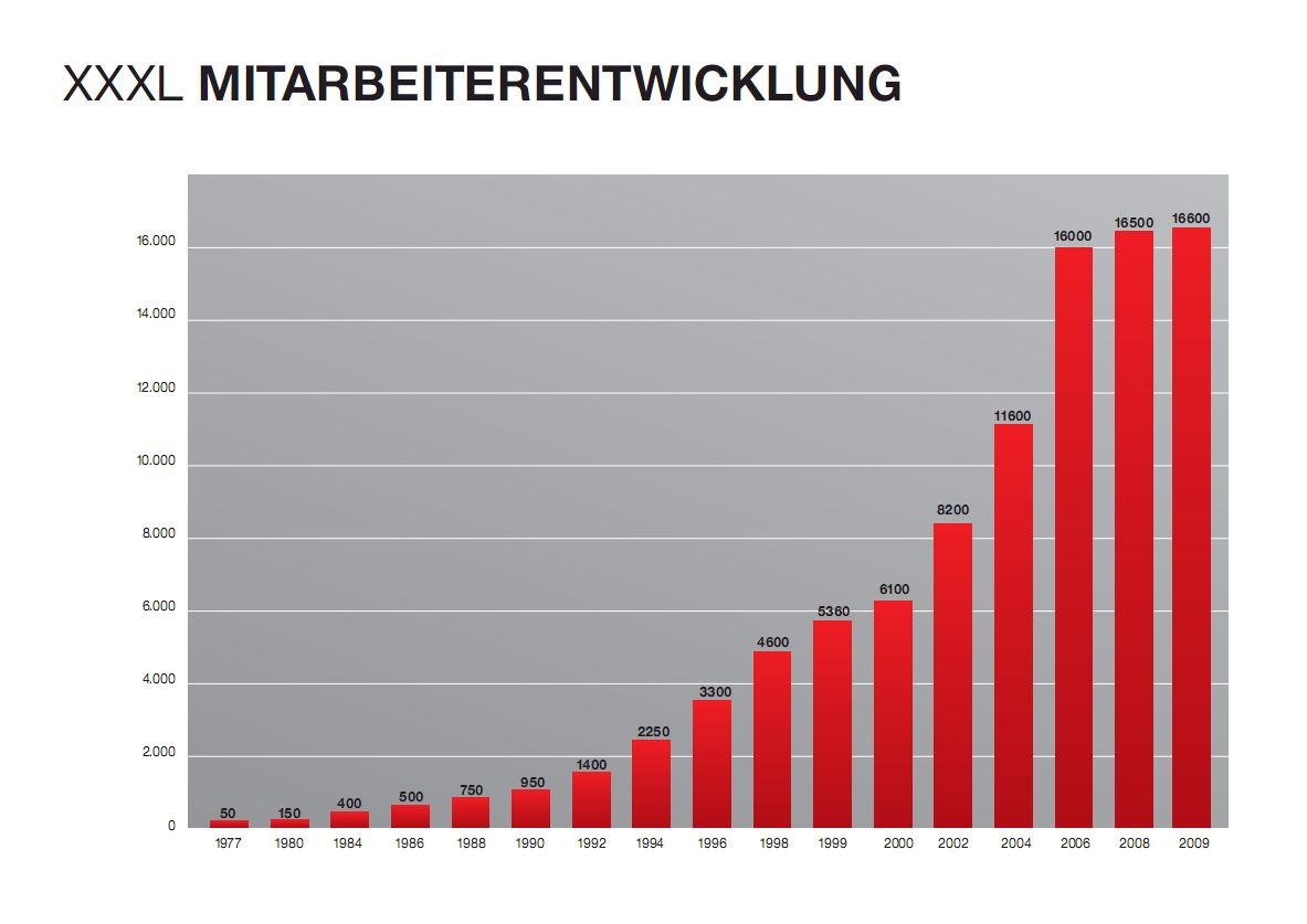 Mitarbeiterentwicklung bei XXXLutz bis zum Jahr 2009